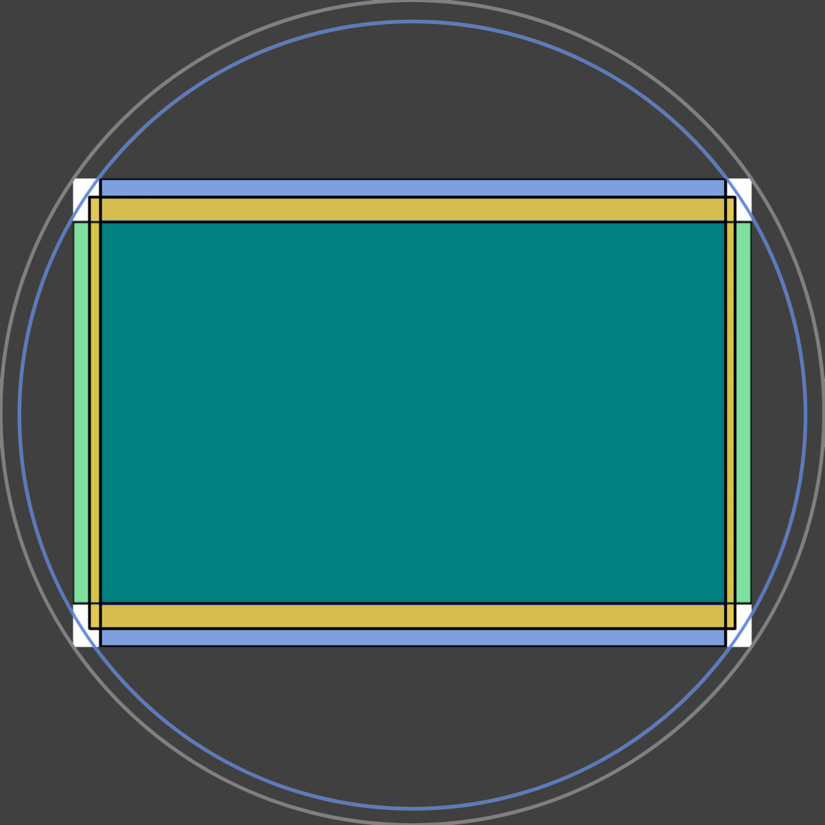 Bildformate der Panasonic Lumix LX-5. 16:9, 3:2, 4:3. Quadrat (1:1) nicht dargestellt. Der sogenannte Multiformatsensor weist bei allen einstellbaren Bildformaten (außer 1:1) denselben diagonalen Bildwinkel auf. Der blaue Kreis zeigt den ausgenutzten Bildkreis für die angebotenen Seitenverhältnisse, der graue den Bildkreis, der für die volle Ausnutzung des Sensors nötig wäre.